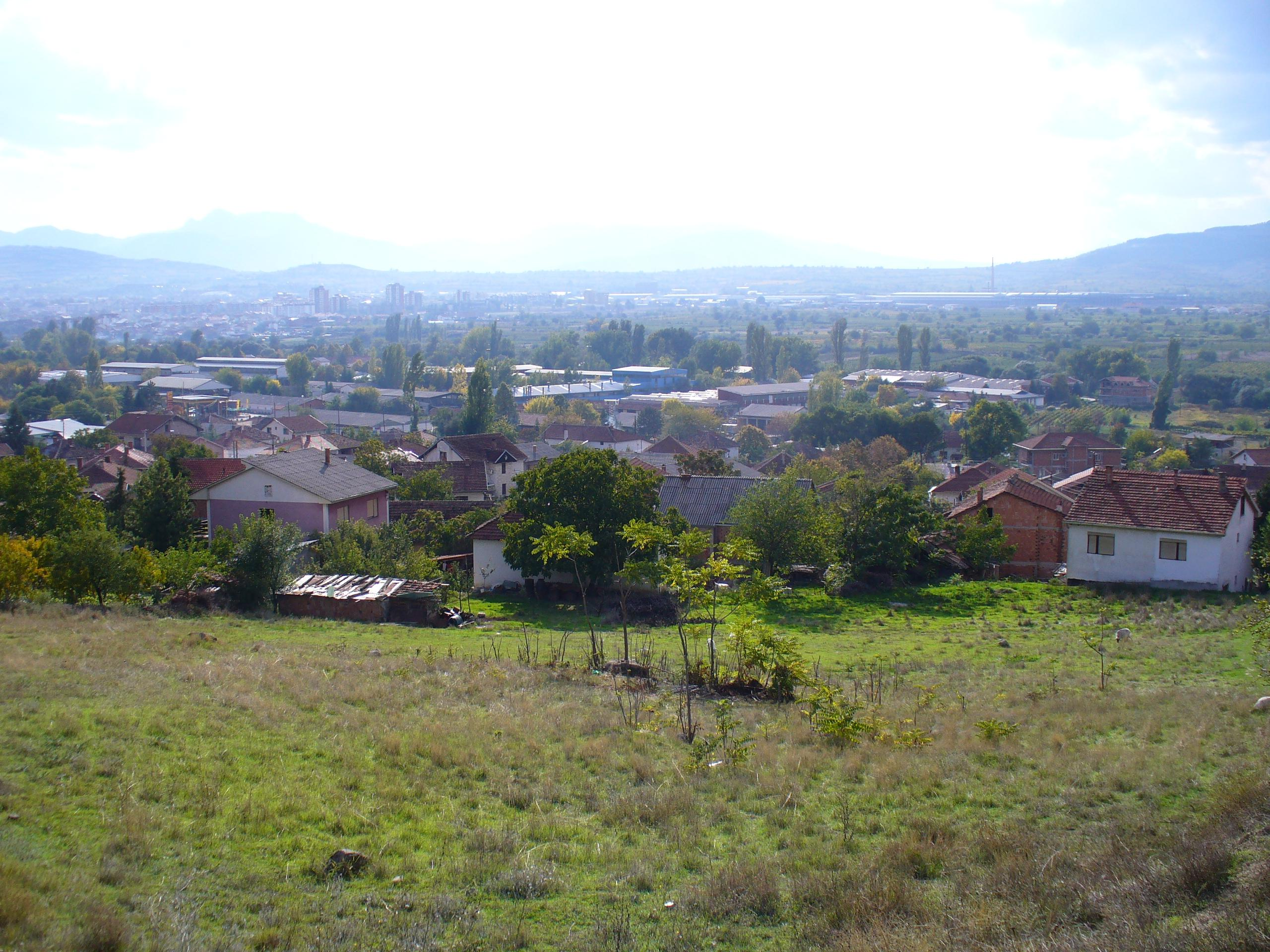 Поглед към село Глишик и град Кавадарци зад него.